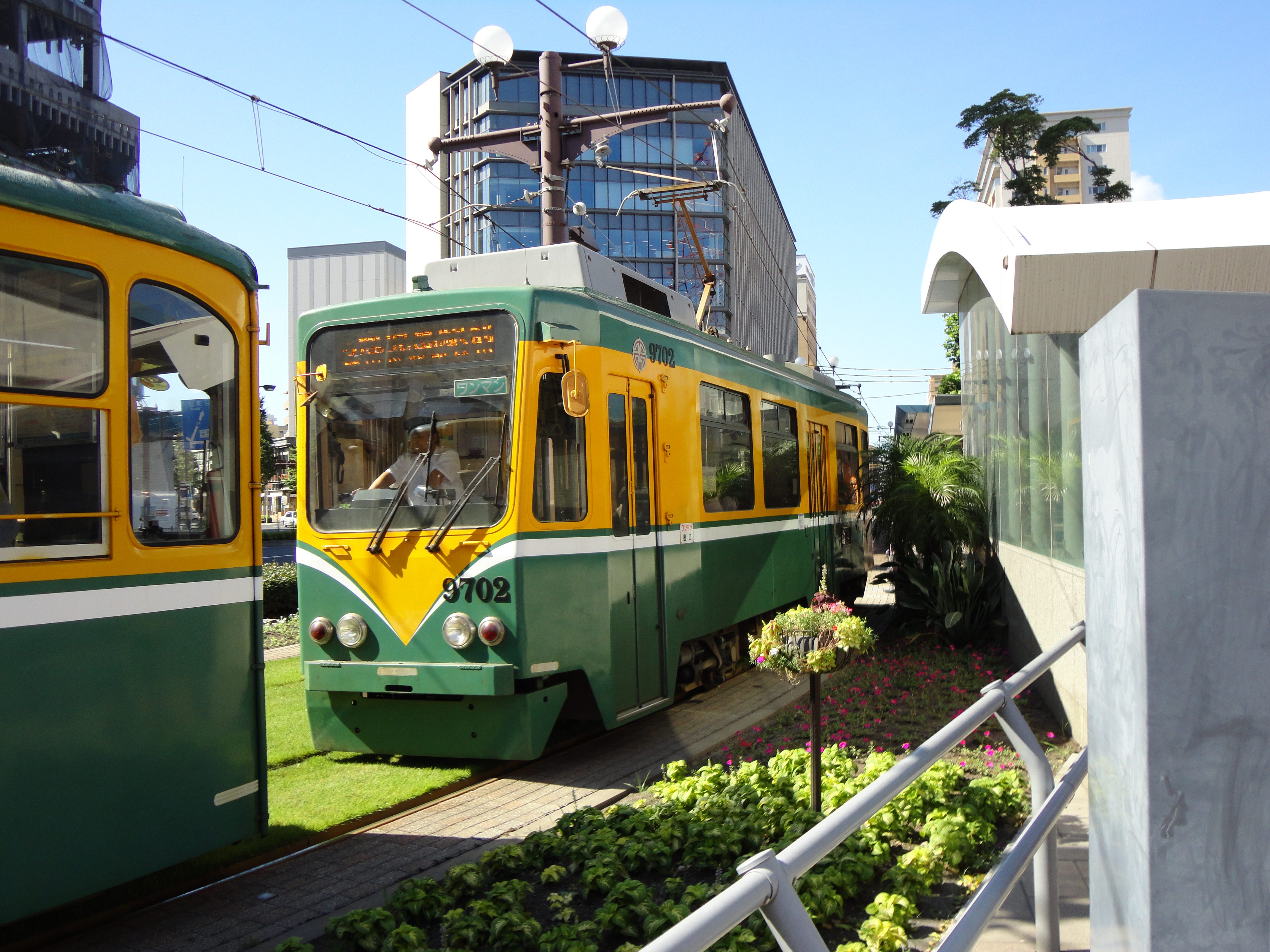 2011年7月14日 投稿者が撮影 鹿児島市交通局9700形9702号車